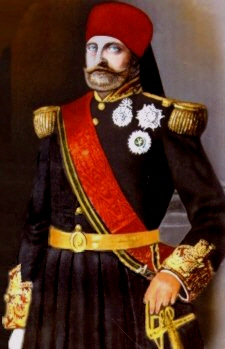 Muhammad Bey Tableau illustrant Mohammed Bey décoré du Nichan Iftikhar et du Nichan ad-Dam Huile sur toile, 223 x 143 cm Tunis, palais présidentiel de Carthage